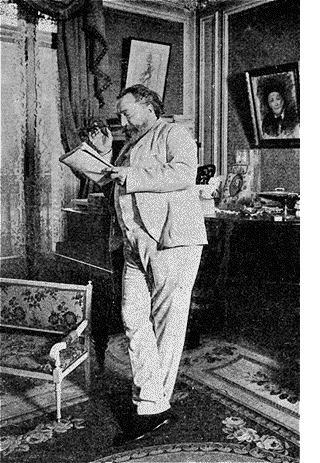 L'Illustration